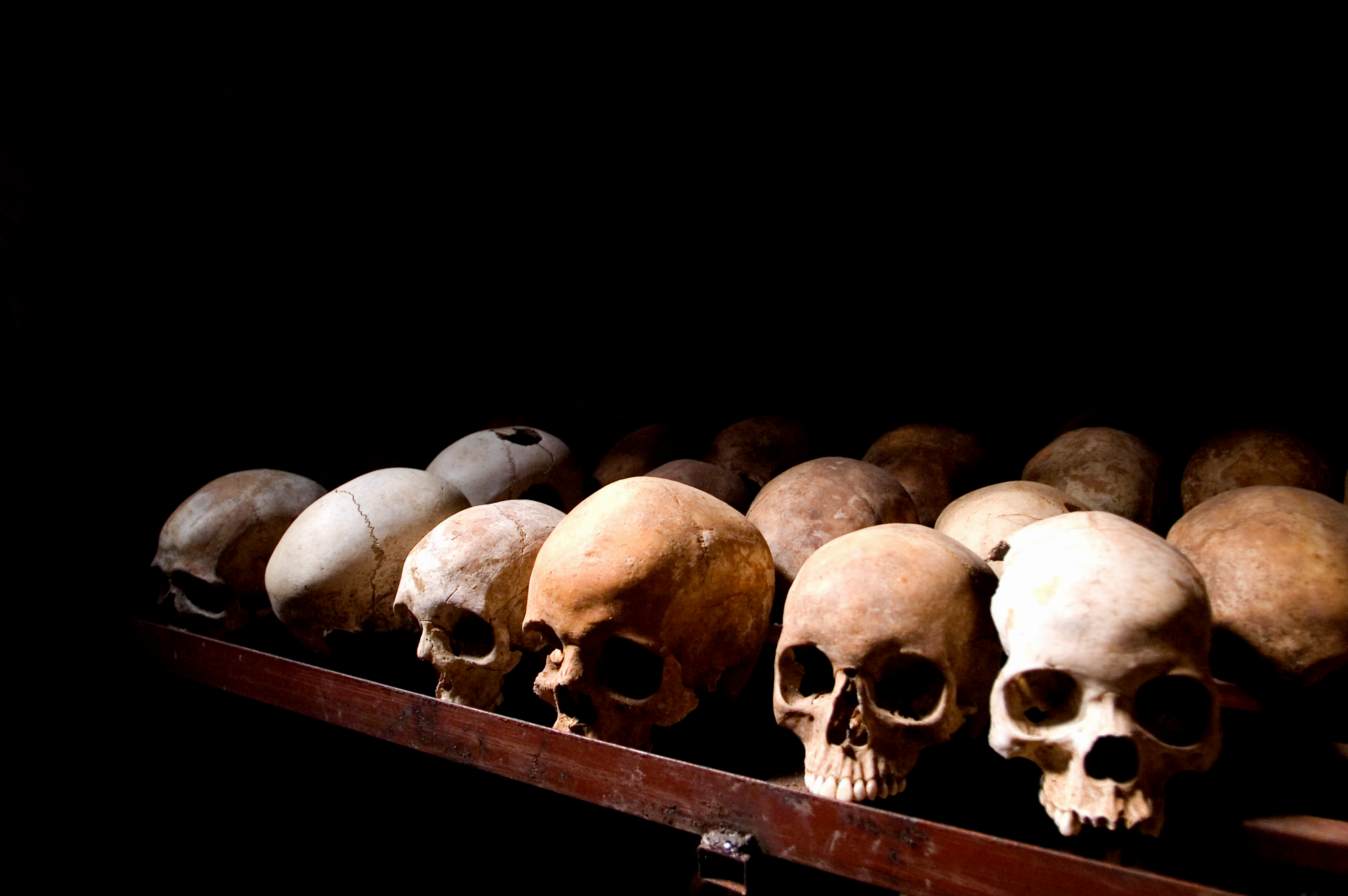 Nyamata Memorial Site, skulls.